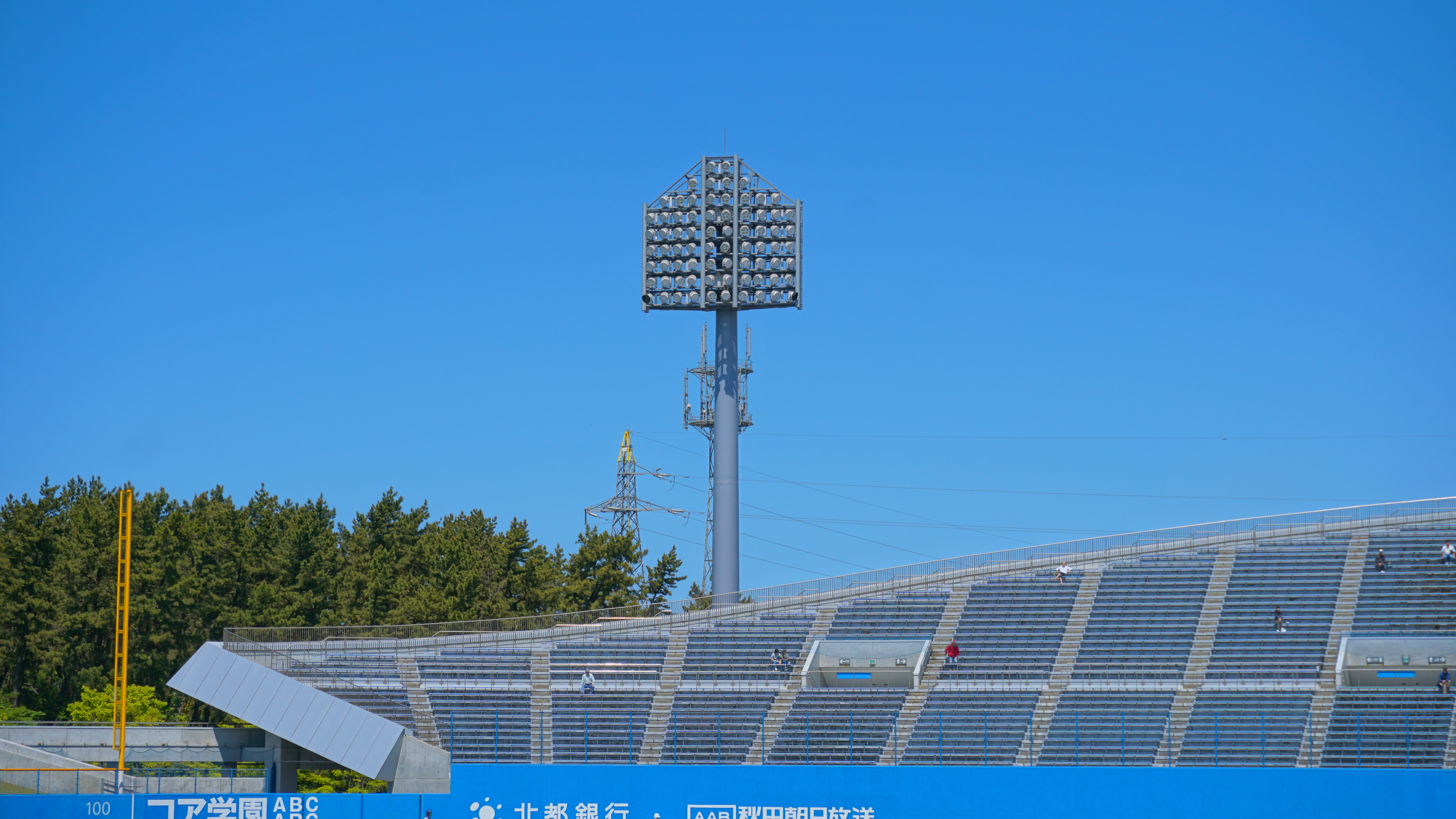 秋田県立野球場（秋田こまちスタジアム）の照明灯。竿燈をモチーフとした形状とされているが、2018年の改修工事で灯具がLED化され、上部が斜めに切り欠かれたような形状へと変わった。